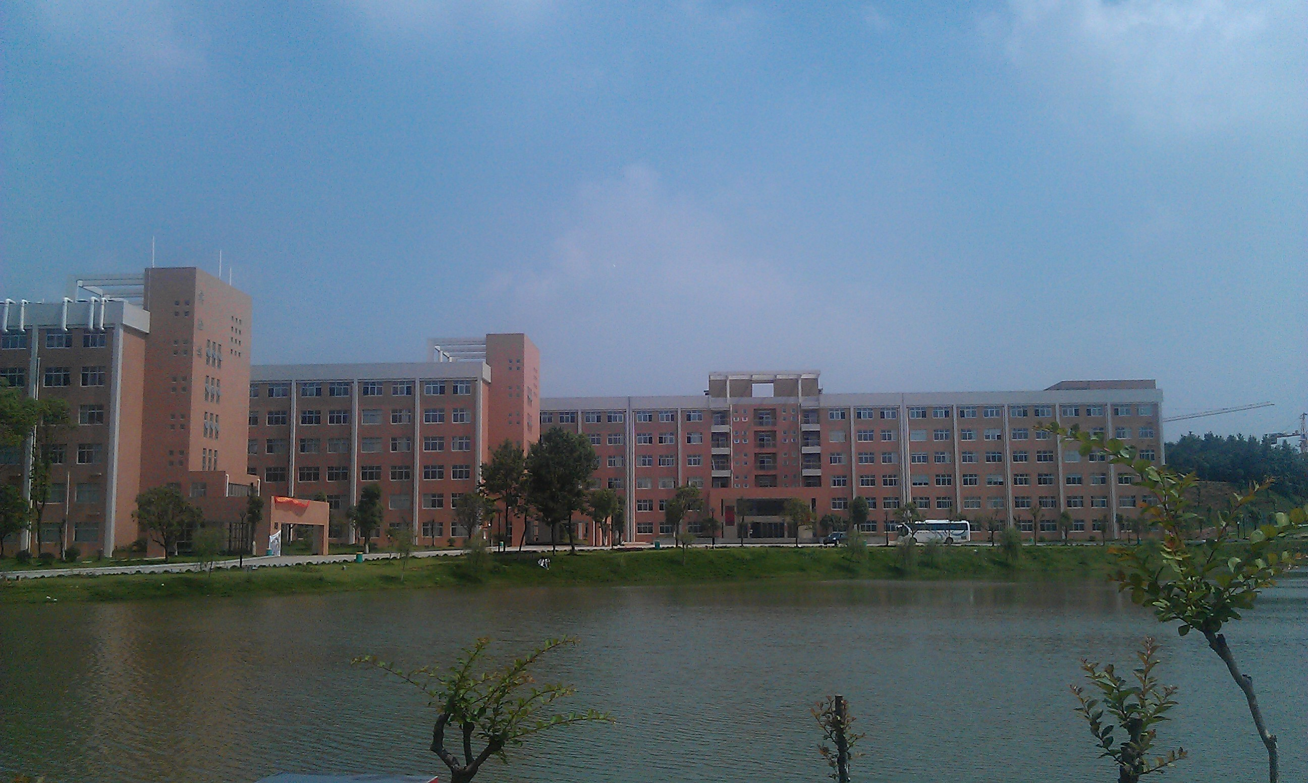 中南林业科技大学，望城区教学楼层。